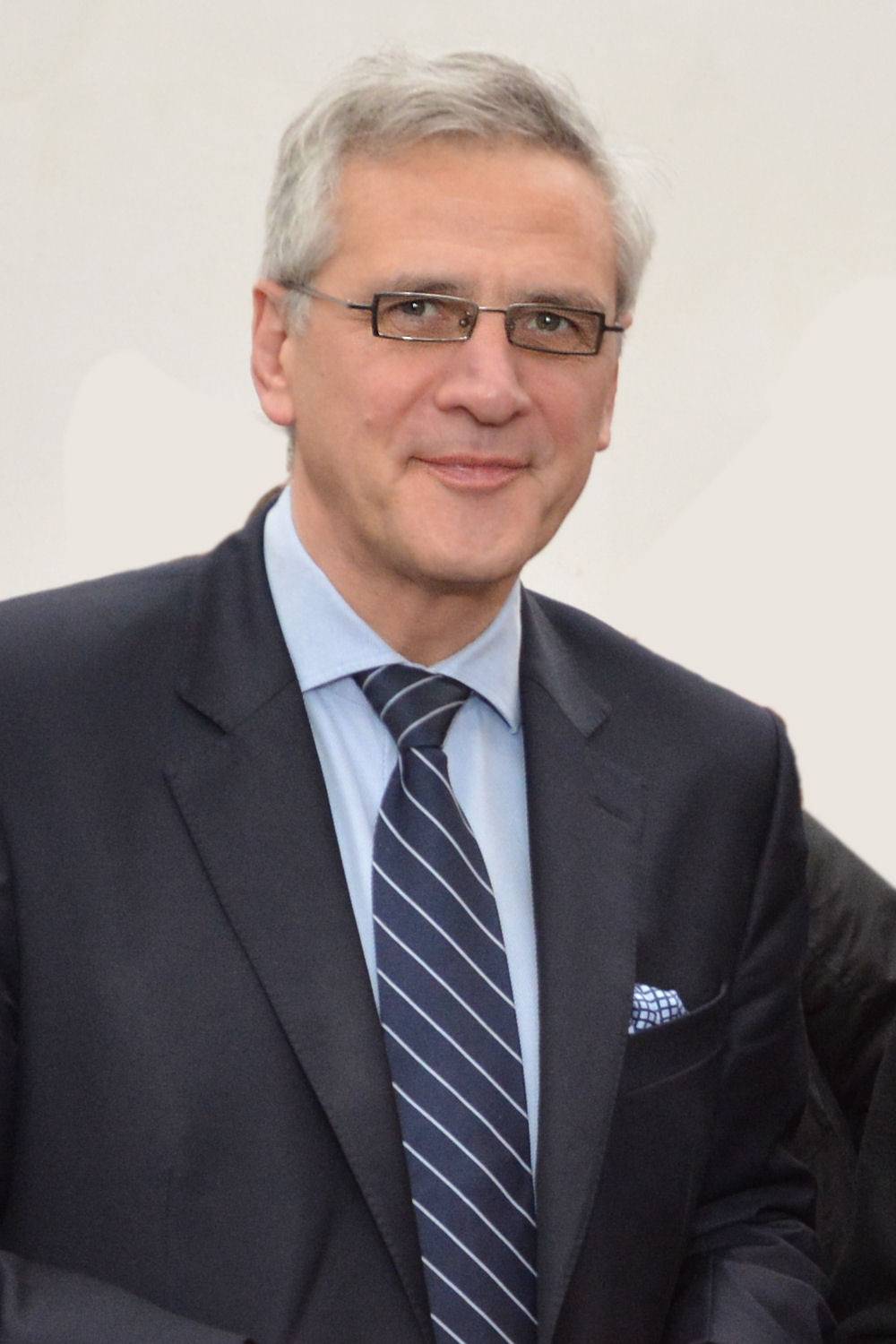 Vlaams Minister-President Kris Peeters op een campagne in gang waarbij Het Vlaamse Kruis gedurende twee jaar in al haar afdelingen in Vlaanderen EHBO-opfrissingscursussen zal aanbieden.